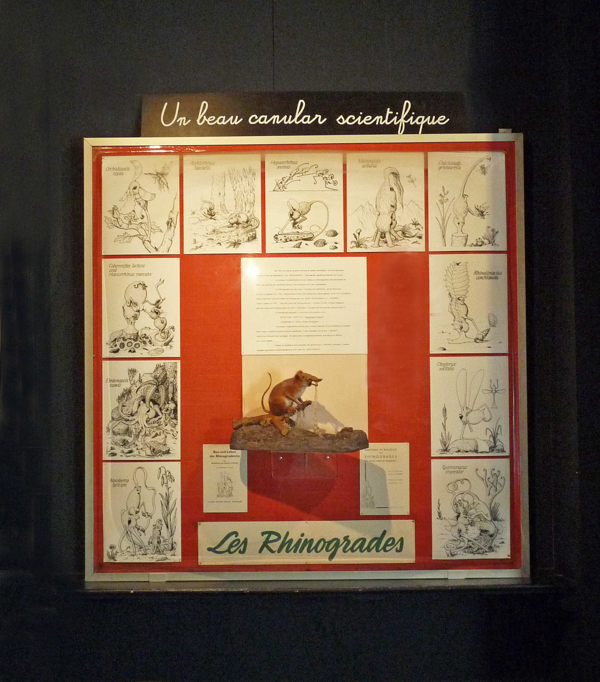 Un canular scientifique : Rhinograde au Musée zoologique de Strasbourg